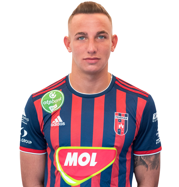 Zsóri Dániel a MOL Fehérvár FC játékosa 2019-ben.